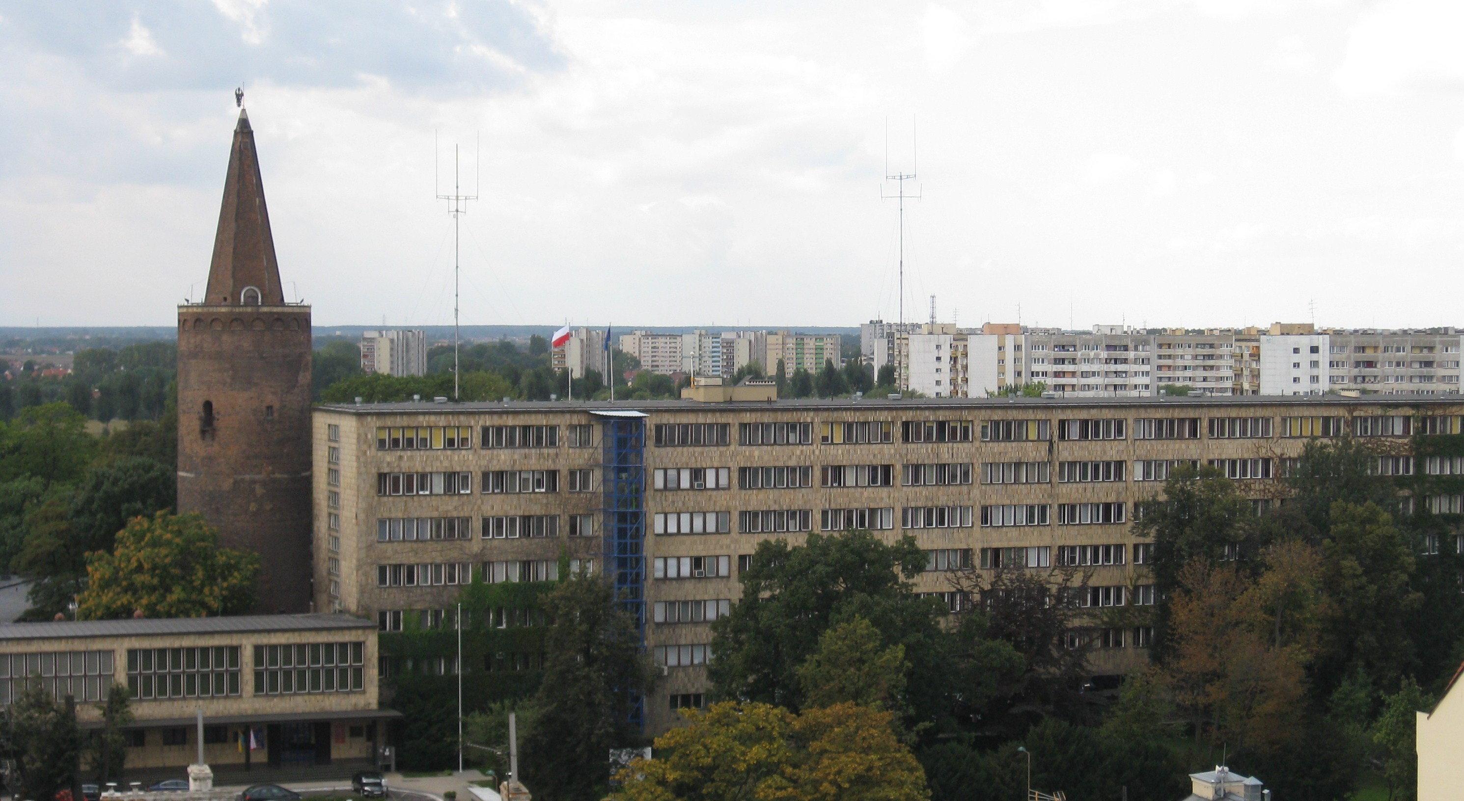 Piastenturm vom Rathaus gesehen